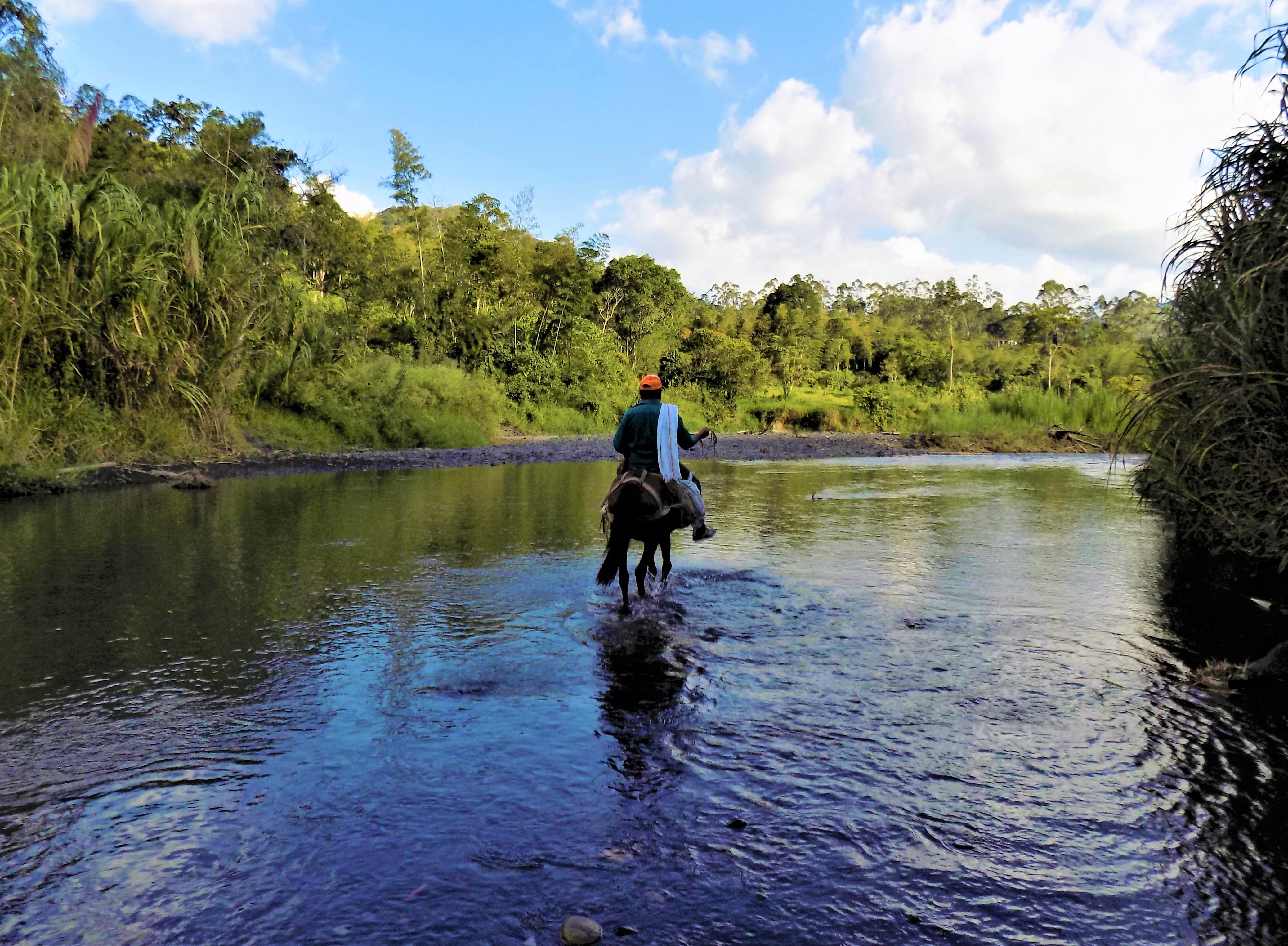 Campesino cruza a caballo el río Murca, que divide al Municipio de La Palma del municipio de Topaipí en el departamento de Cundinamarca